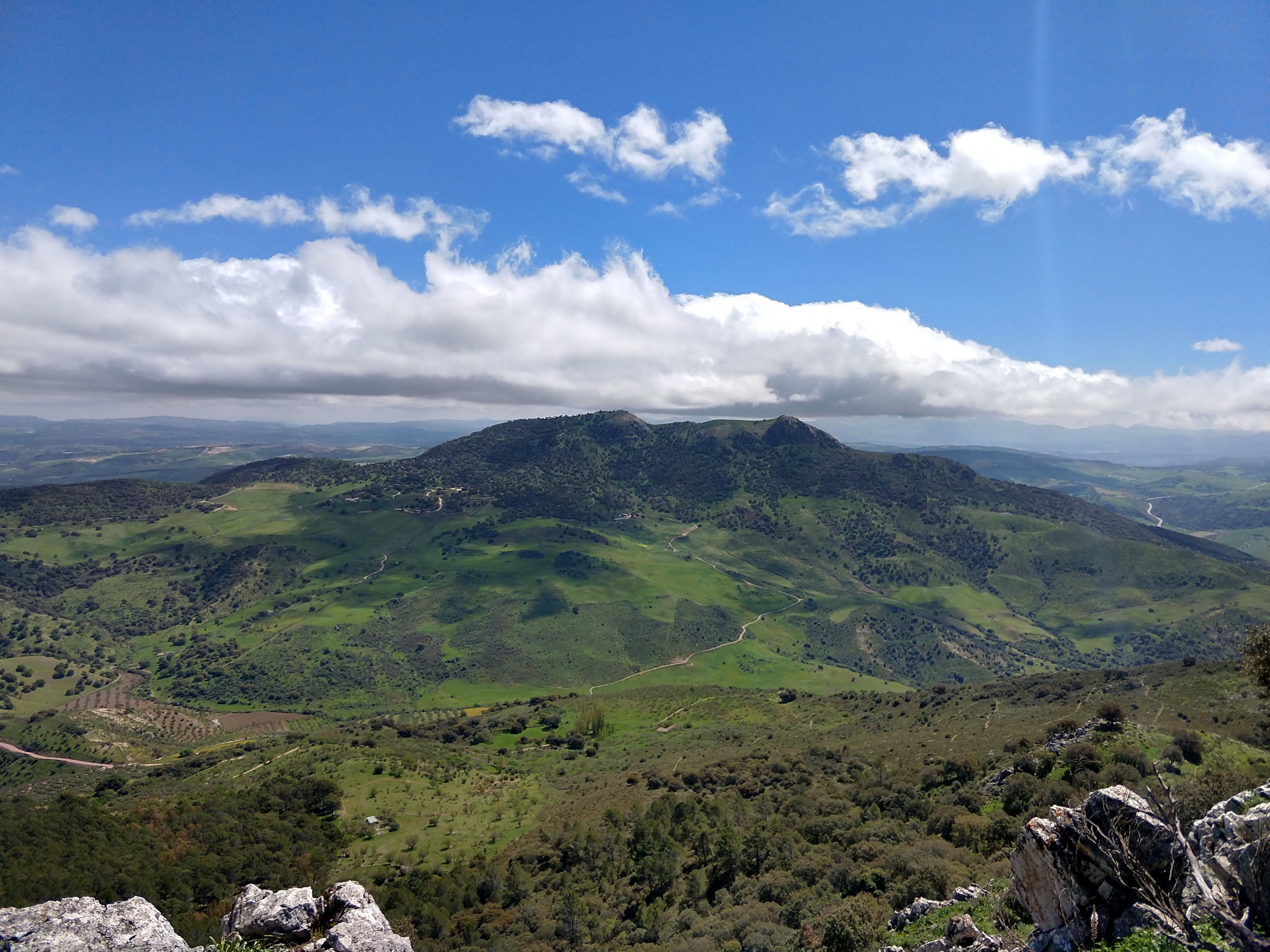 Vista del Pico Malaver en abril de 2018 desde el vecino Pico Lagarín